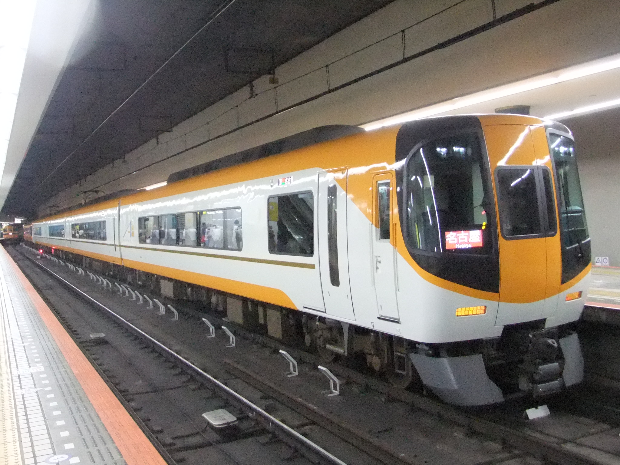 近鉄22000系リニューアル車 2016年4月9日 大阪難波駅